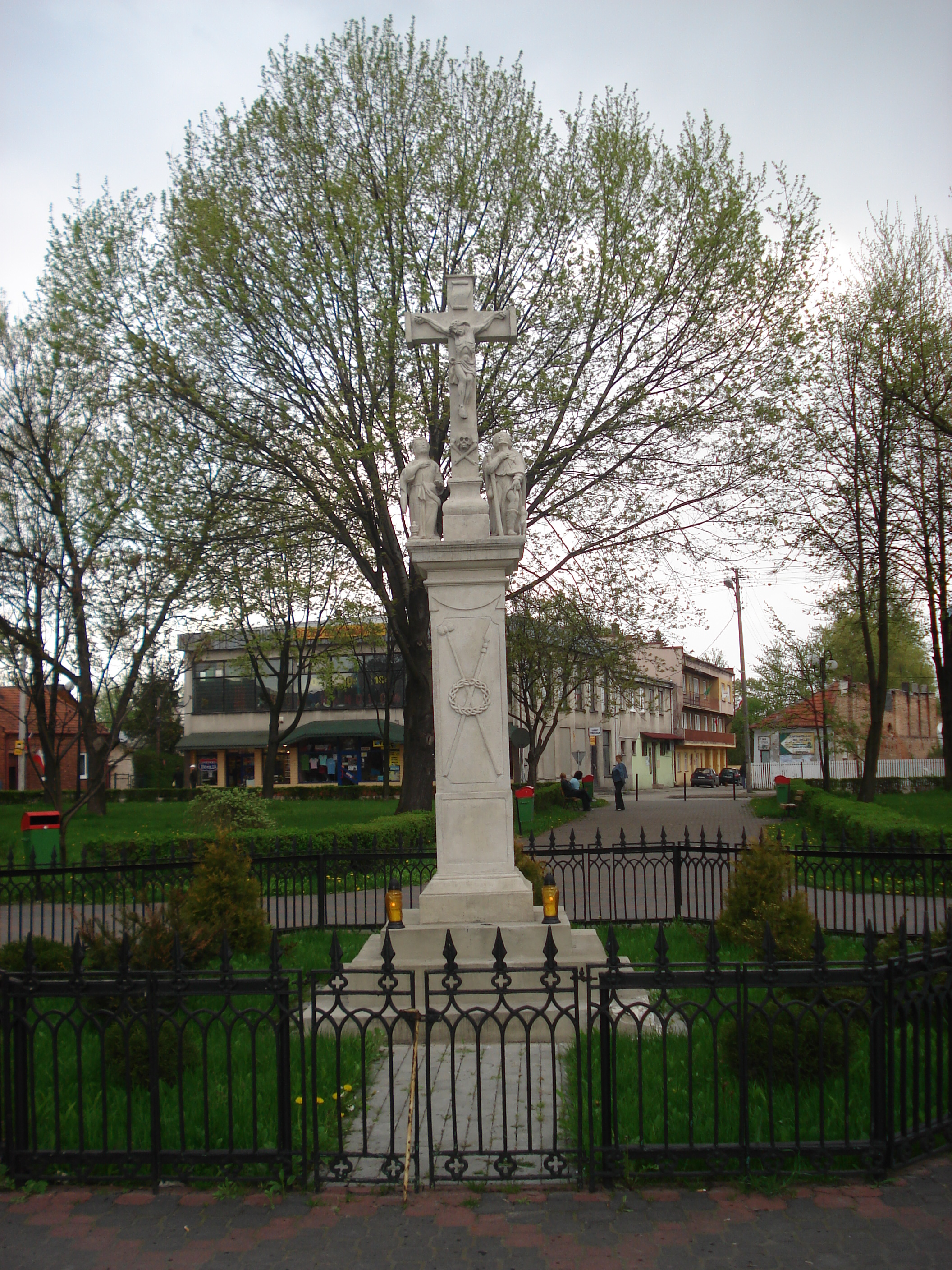 Kamienny krzyż z figurami św. Rozalii i św. Rocha.